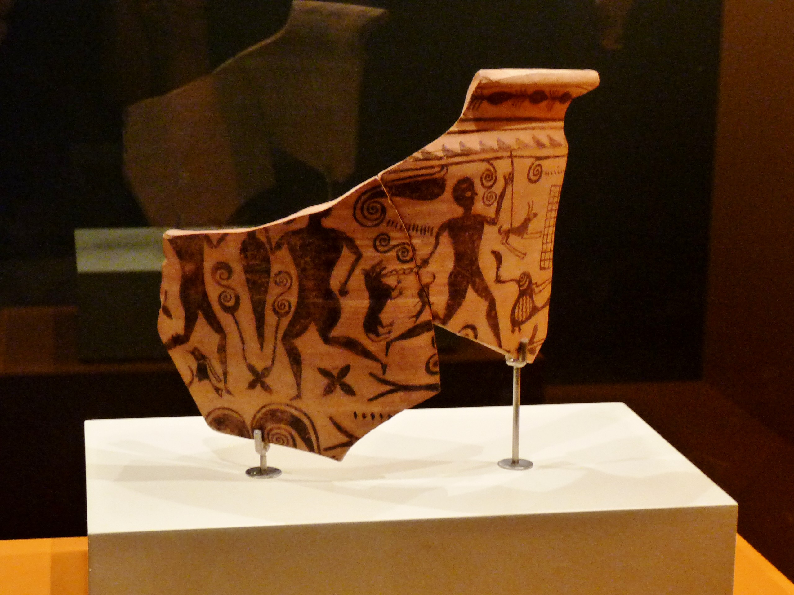 Museo de Teruel - Danza lúdica - Kálathos - El Castelillo de Alloza, Teruel - s. II a.C. - Danza agónica en torno a un ánfora de vino. Exposición: “Reflejos de Apolo. Deporte y Arqueología en el Mediterráneo antiguo”, Museo de Zaragoza.